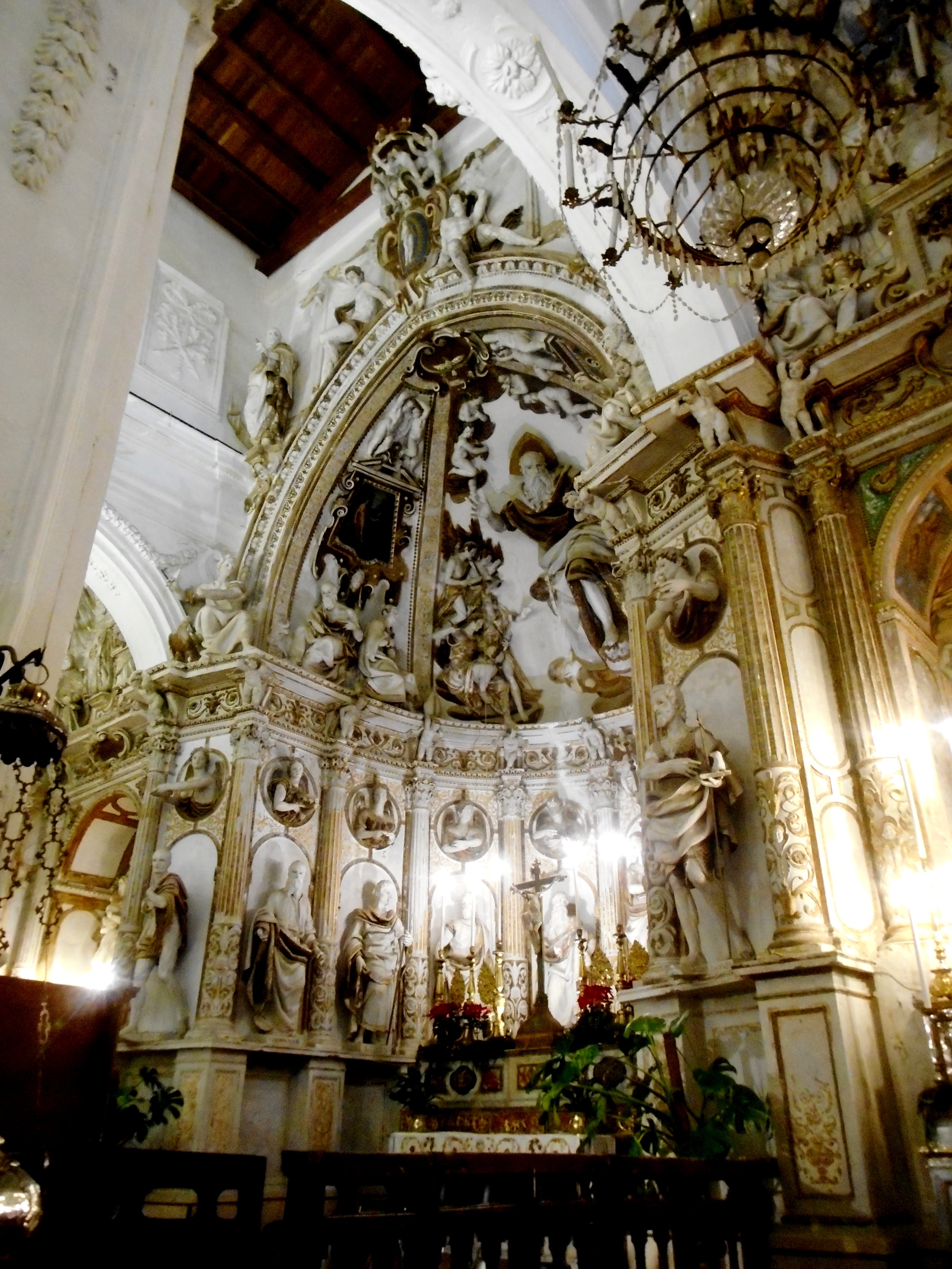 Tribuna nell'abside della Chiesa Madre di Ciminna